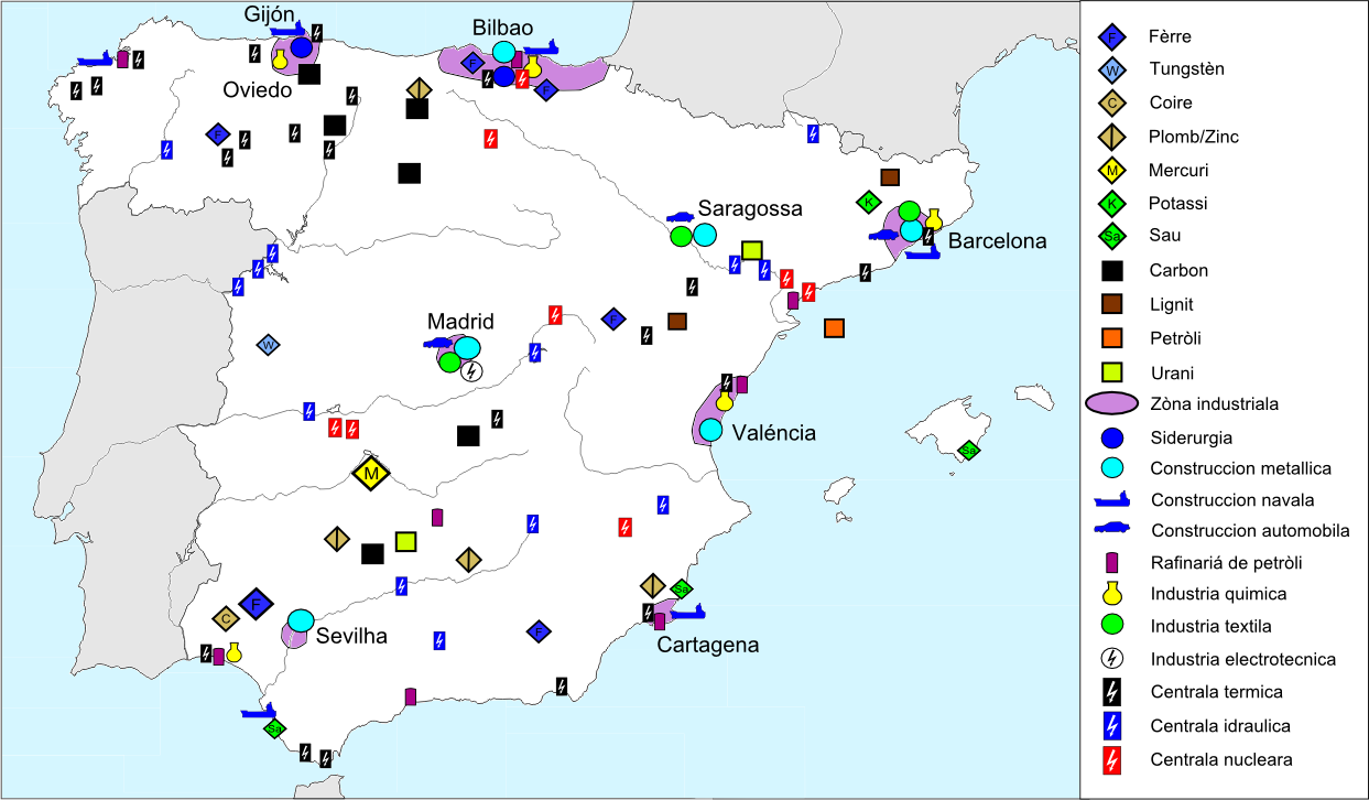 Ressorsas naturalas e industria d'Espanha.